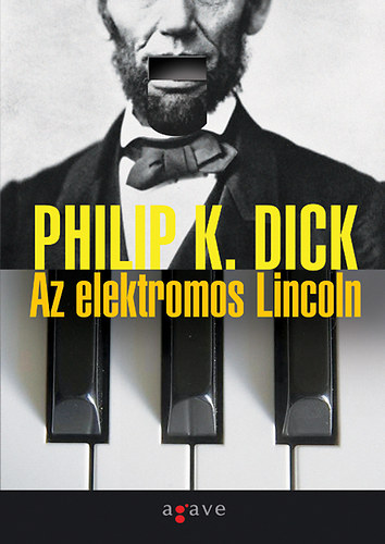 Philip K. Dick Az elektromos Lincoln című könyvének borítója, magyar kiadás